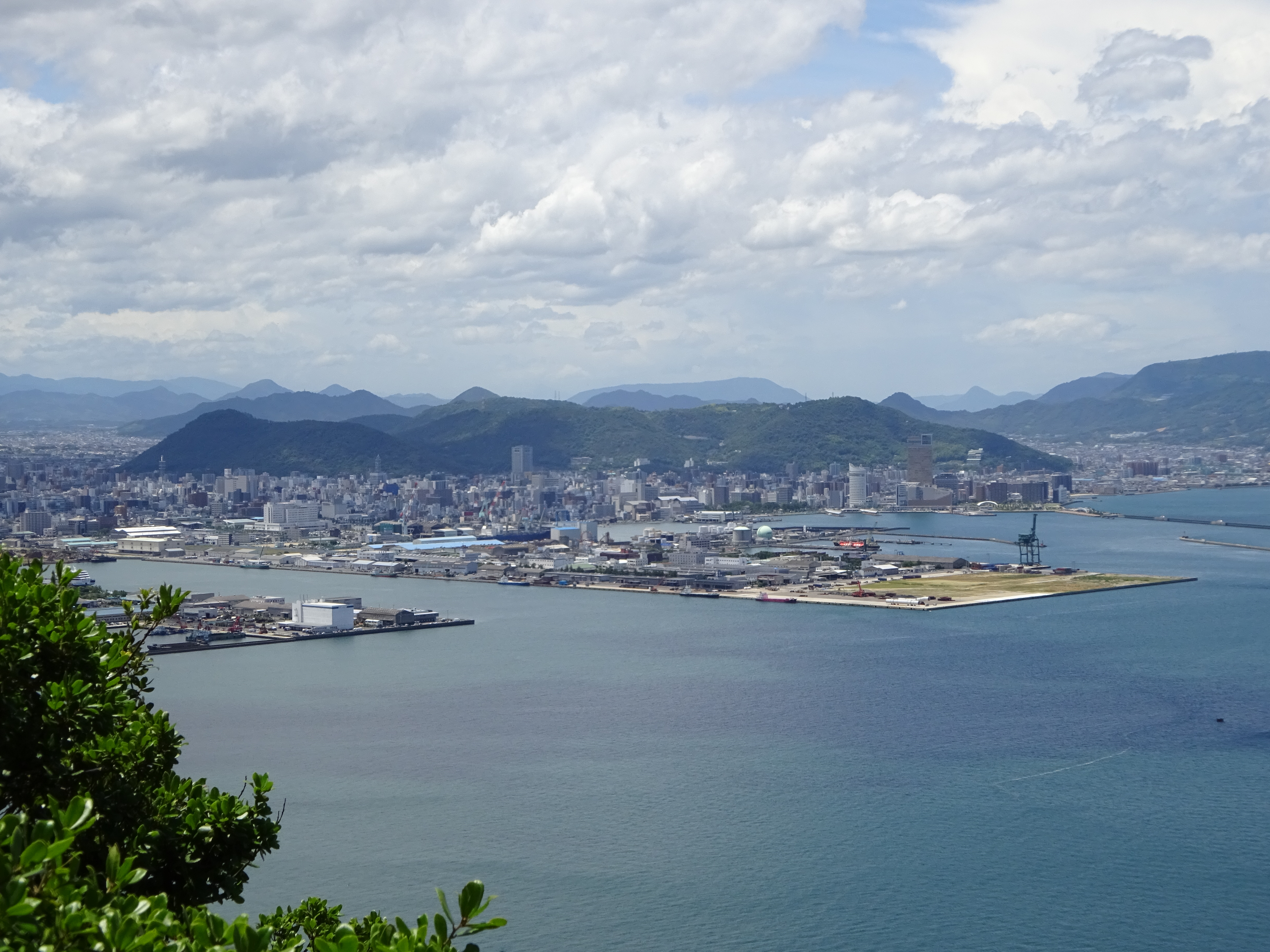 北東の屋島北嶺北端の山上で遠望、七月上旬